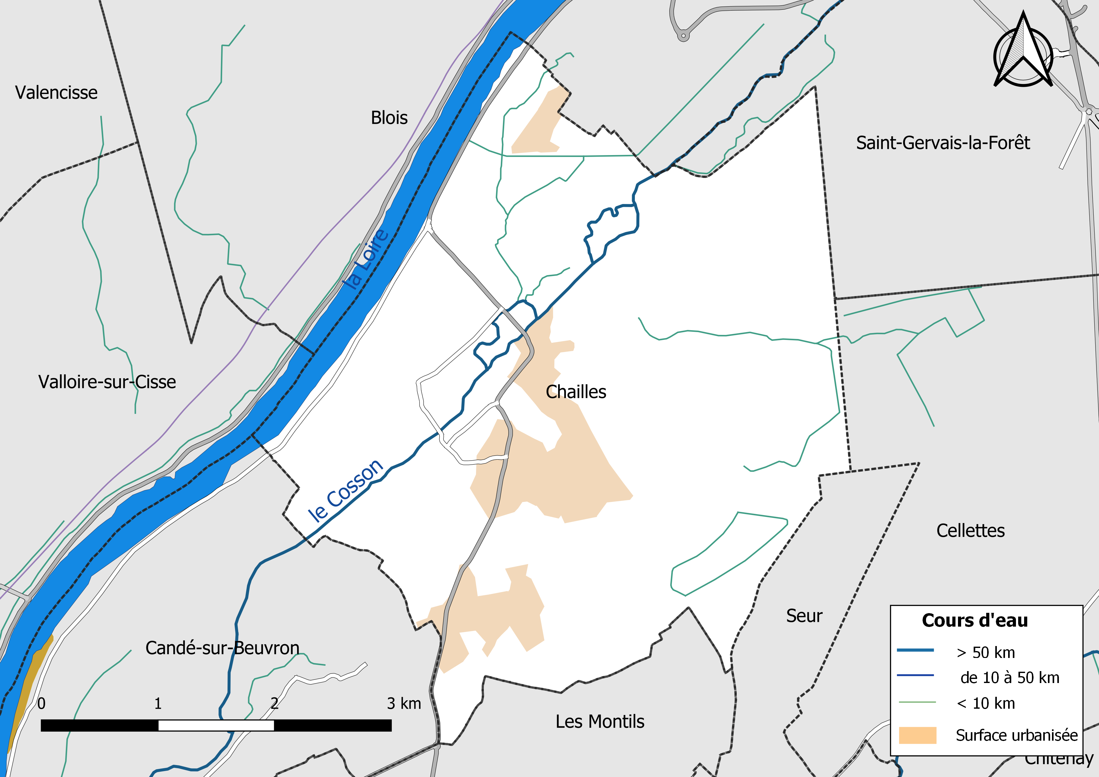 Carte du réseau hydrographique de la commune de Chailles (Loir-et-Cher, France).